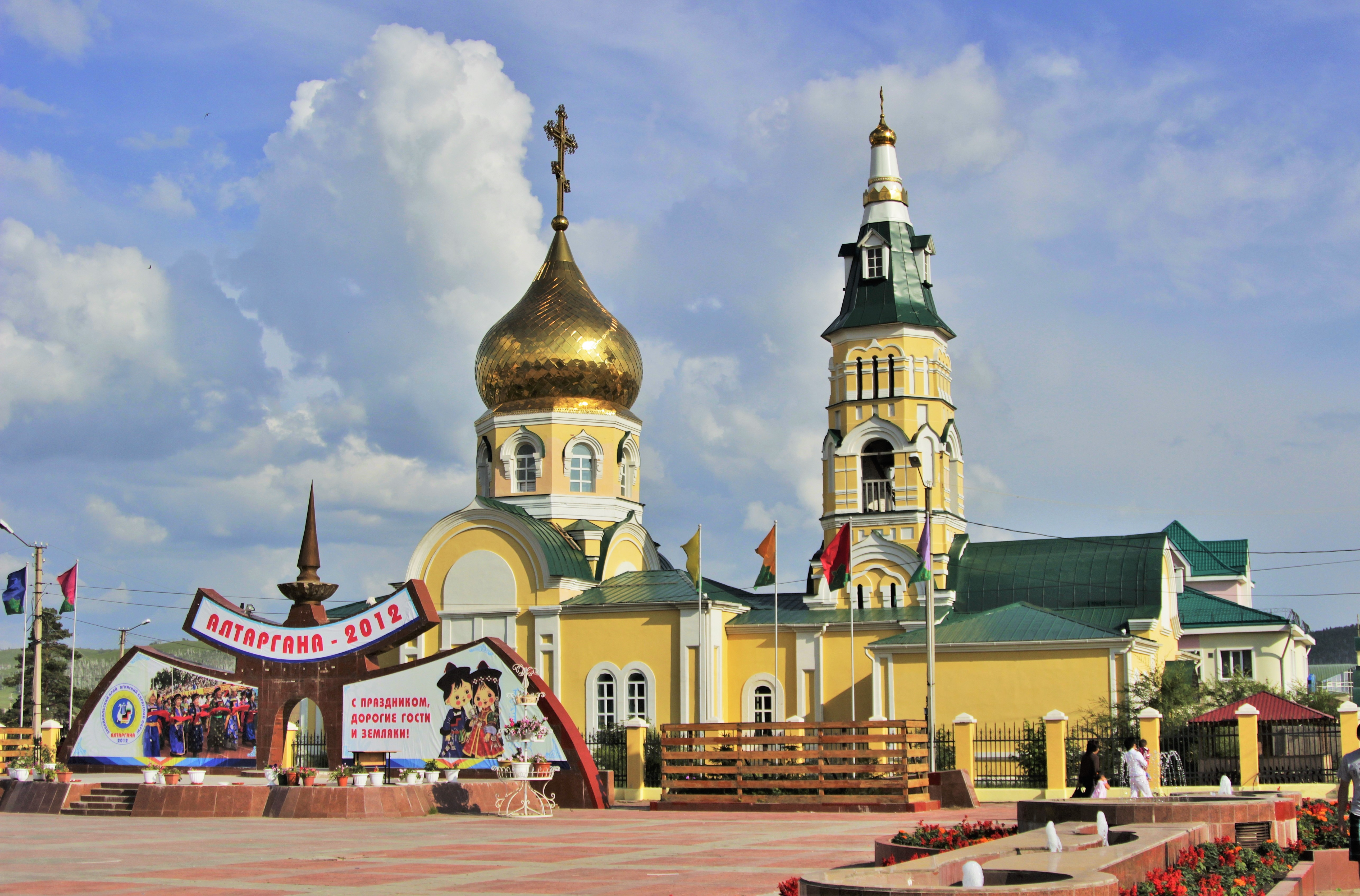 Свято-Никольский храм в центре поселка Агинское Забайкальского края